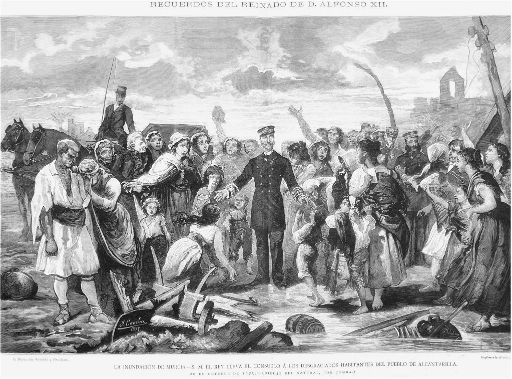 Alfonso XII di Spagna soccorre gli abitanti di Alcantarilla colpiti dall'inondazione di Murcia